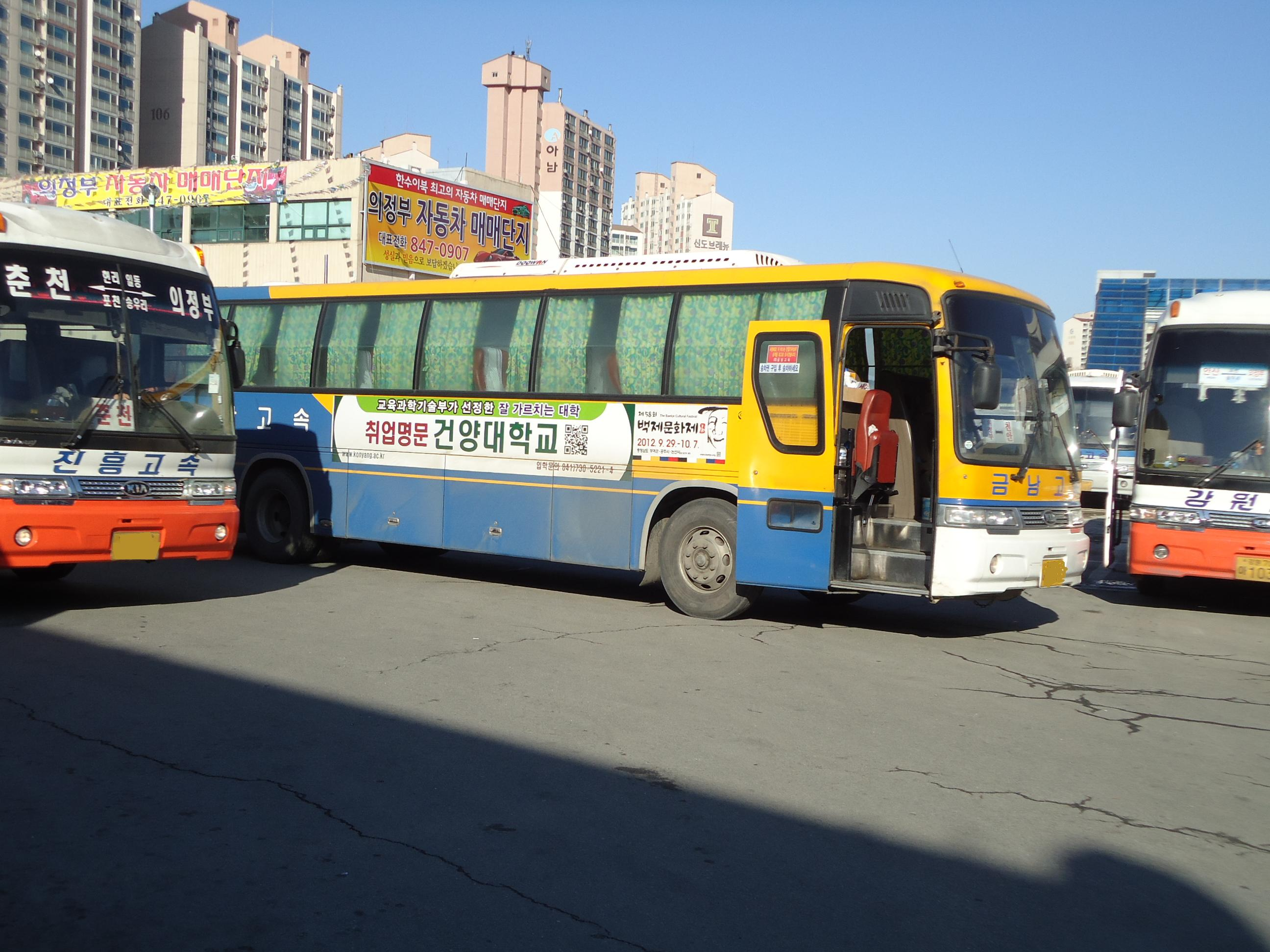 금남고속 그랜버드 SDⅠ그린필드(의정부-천안)